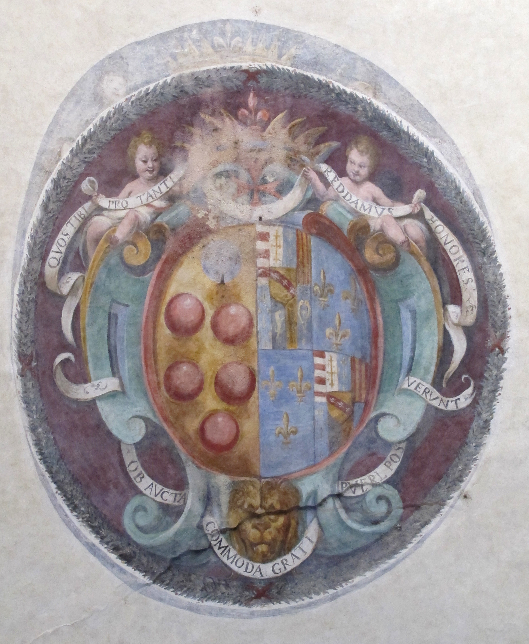 Via della Colonna, Firenze